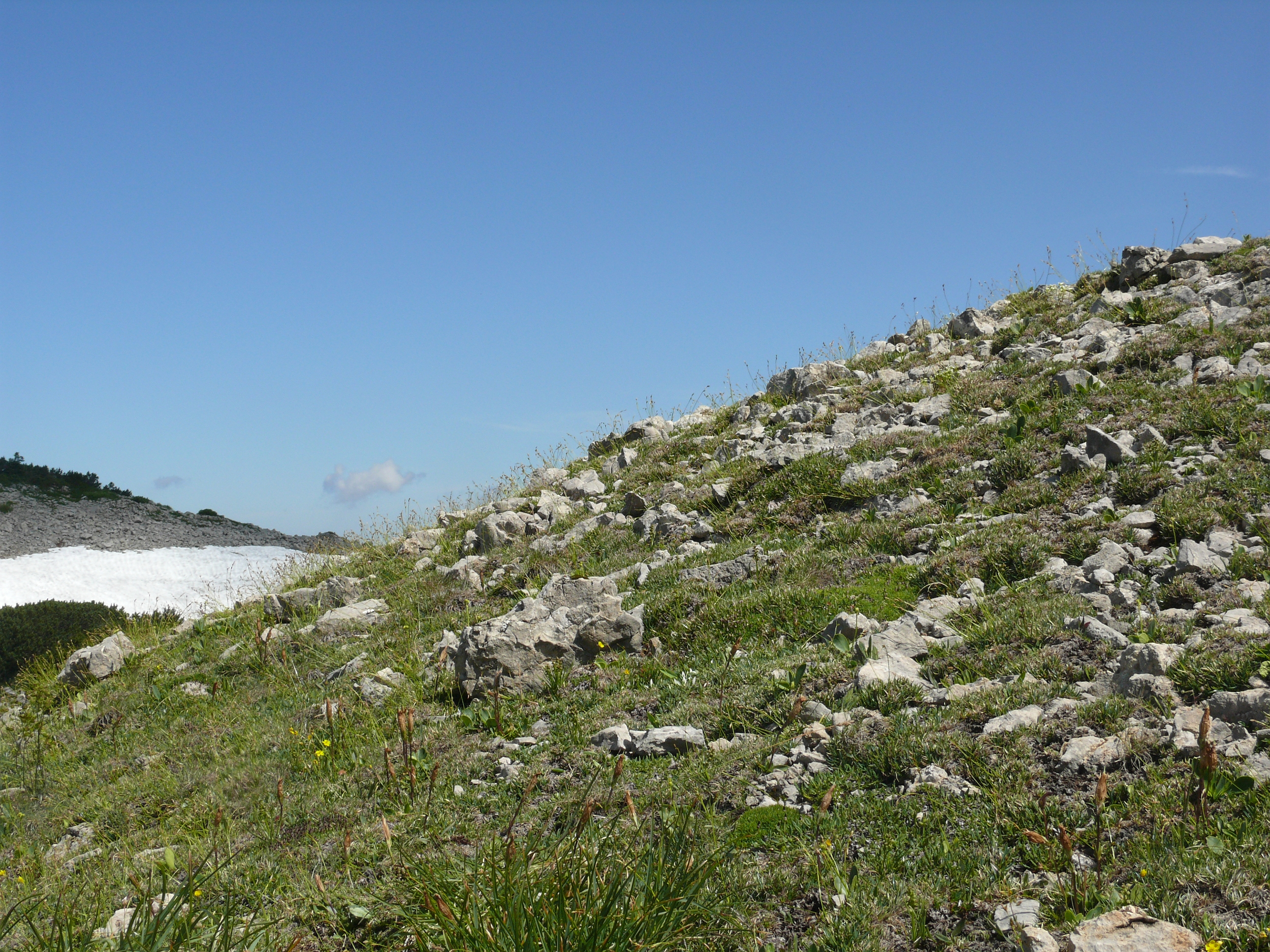 Caricetum firmae unter anderem mit Carex firma Chamorchis alpina Dryas octopetala Gentiana clusii Primula auricula Allgäuer Alpen, Österreich